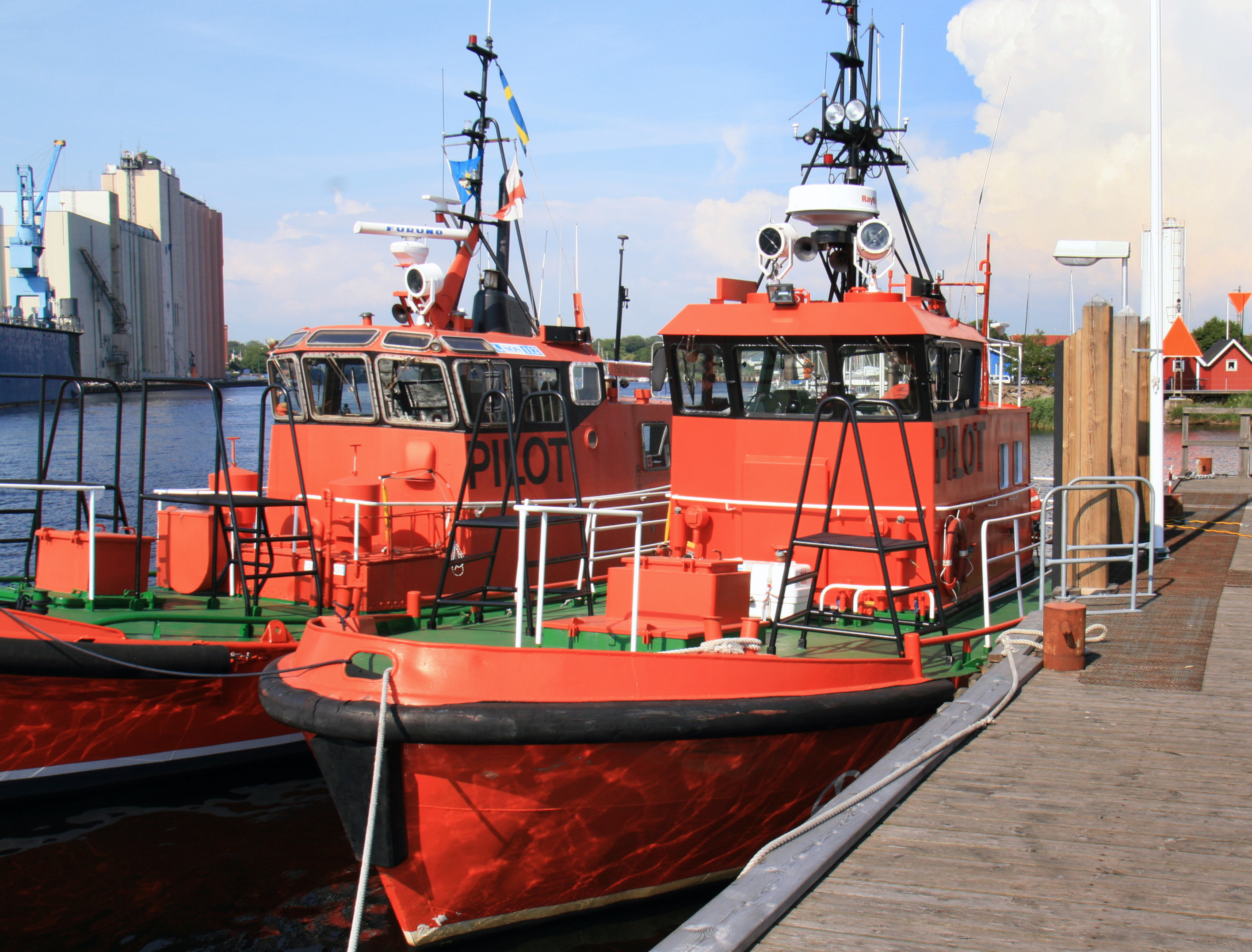 Pilot 774 SE i Falkenberg 2 juli 2009.